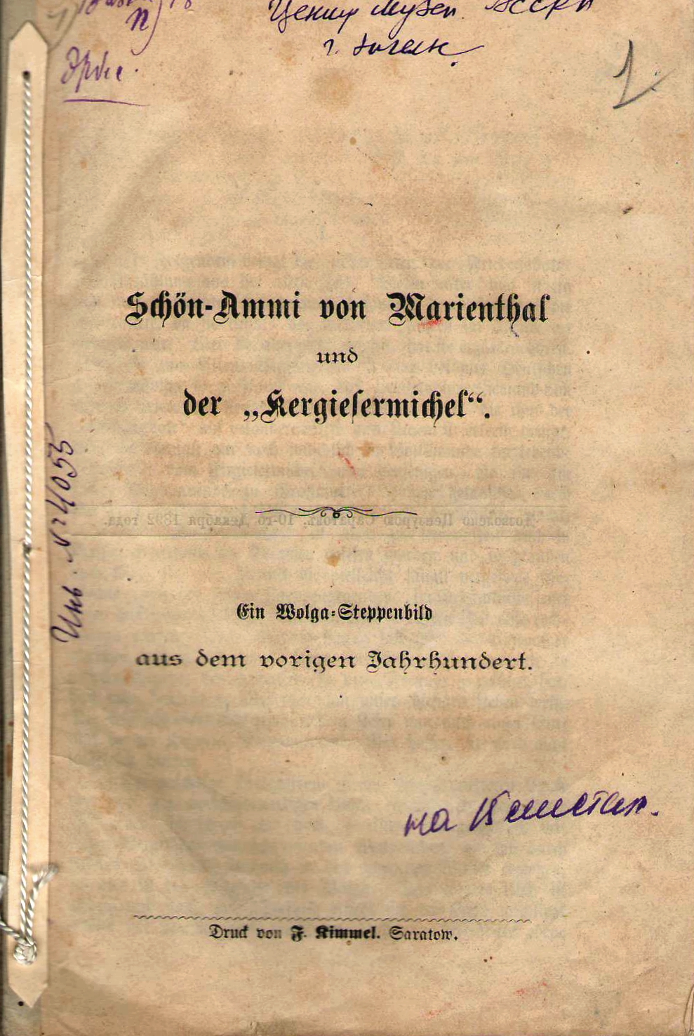 Titelblatt von „Schön-Аmmi von Marienthal und der "Kergiesermichel"“. Ein Steppenbild aus dem vorigen Jahrhundert. Druck von F. Kimmel, Saratow